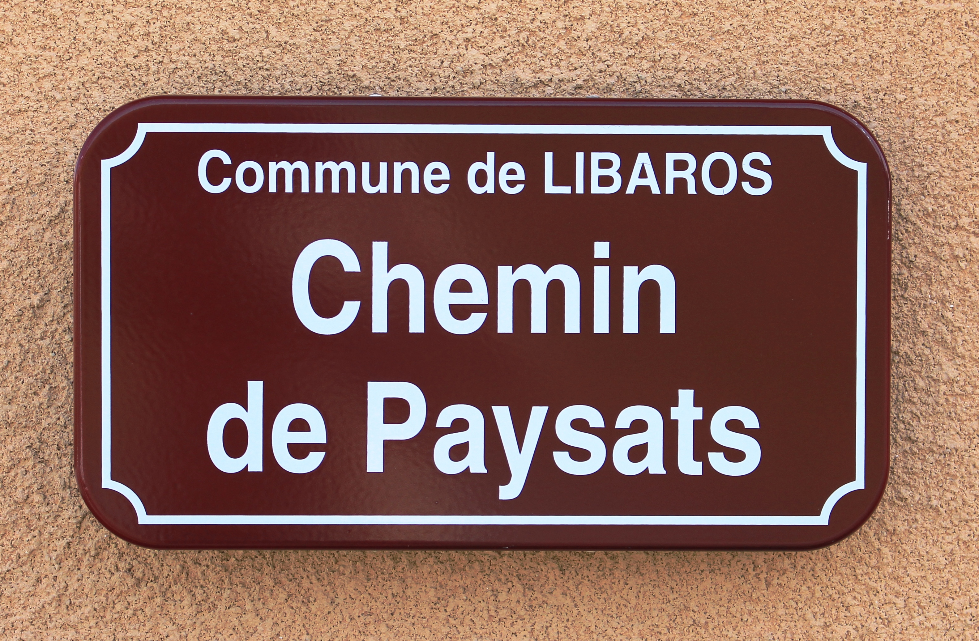 Rue du village de Libaros (Hautes-Pyrénées)